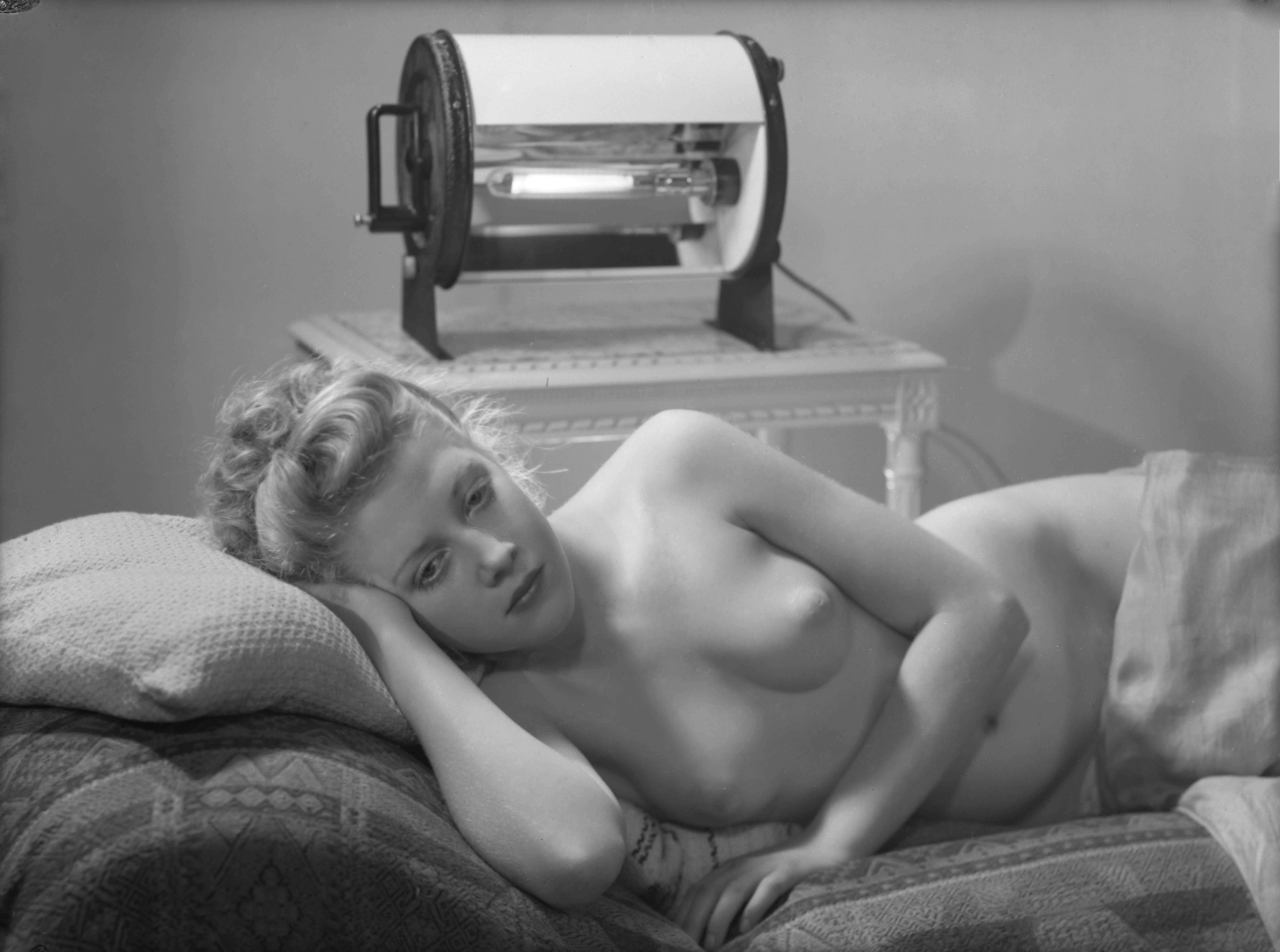 Beschrijving Reclame voor Philips hoogtezon Documenttype foto Vervaardiger Merkelbach, Atelier J. Collectie Collectie Atelier J. Merkelbach Datering 1946 ca. Inventarissen Afbeeldingsbestand 010164033195 Generated with Dememorixer